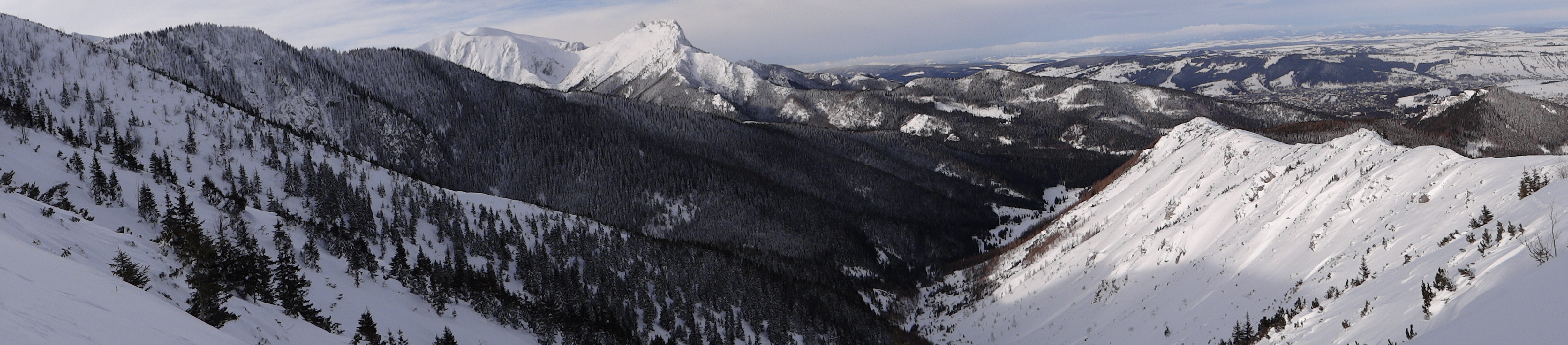 Widok z okolic przełęczy między Kopami